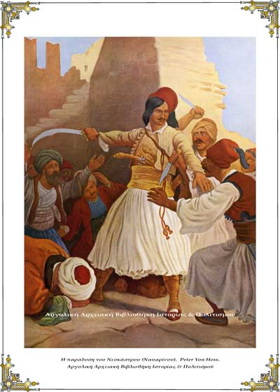 Η παράδοση του Νεοκάστρου